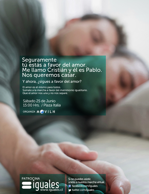 Campaña de Iguales Chile junto al Movimiento de Integración y Liberación Homosexual a favor del matrimonio entre personas del mismo sexo en Chile y marcha a favor de este para el 25 de junio de 2011.